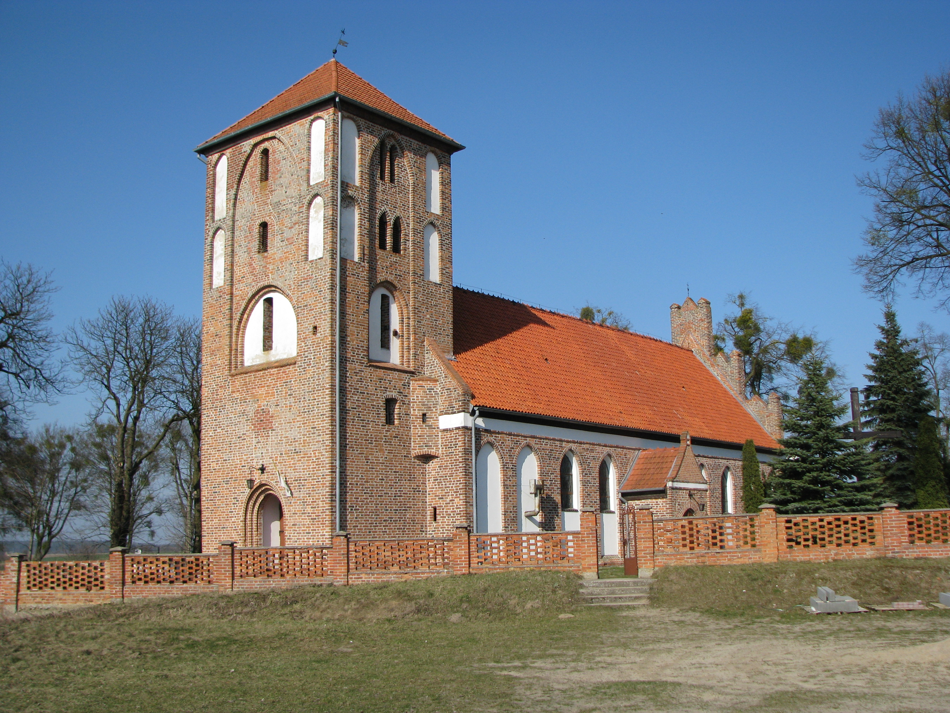 Żmijewo - rzymskokatolicki kościół parafialny p.w. św. Jakuba Apostoła, ok. 1330, 1935